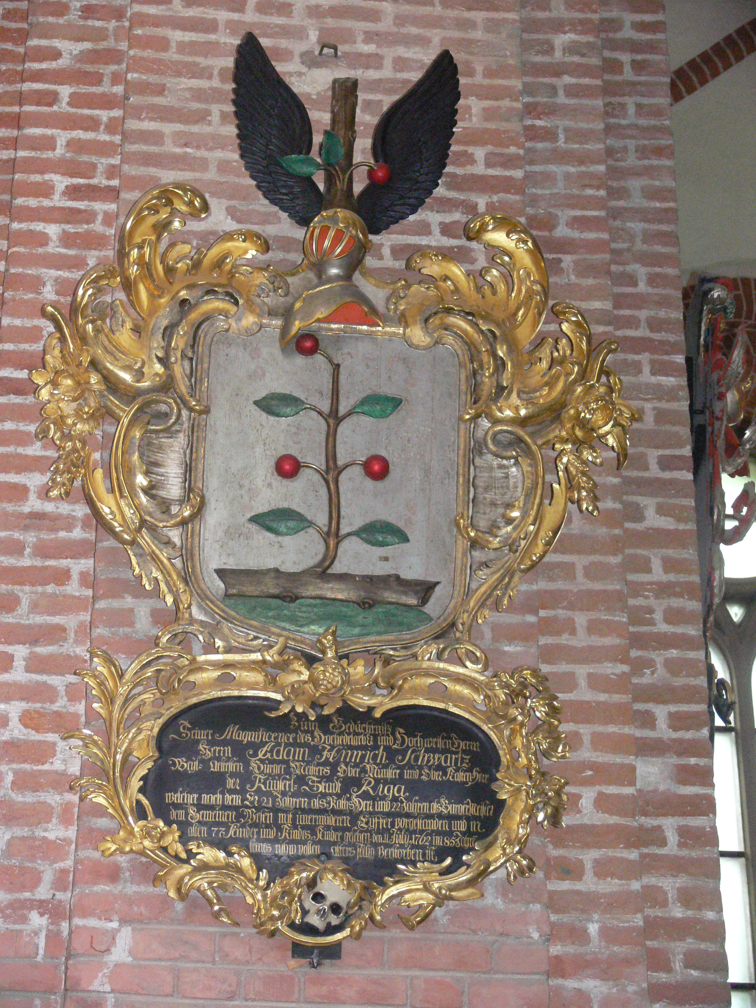 Coat of arms of Adam Hinrich Schwartz, Bürgermeister in Riga (1678—1762). In der Kirche St. Peter in Riga.